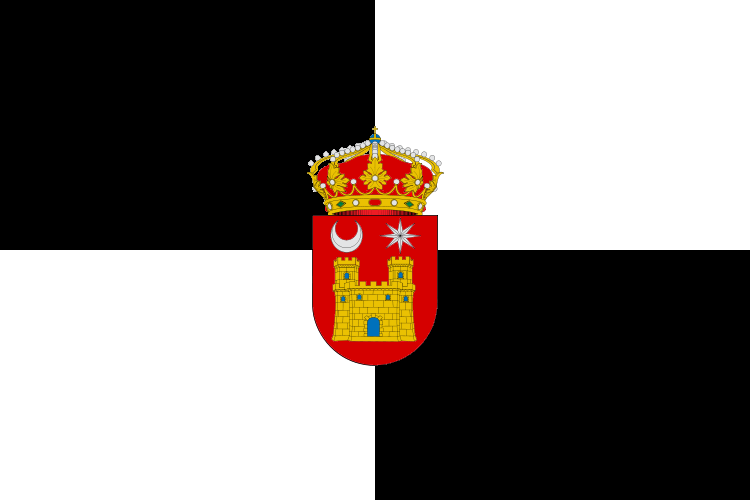 Bandera municipal del Ayuntamiento de Alarcón (Cuenca) - Escudo by SanchoXXI